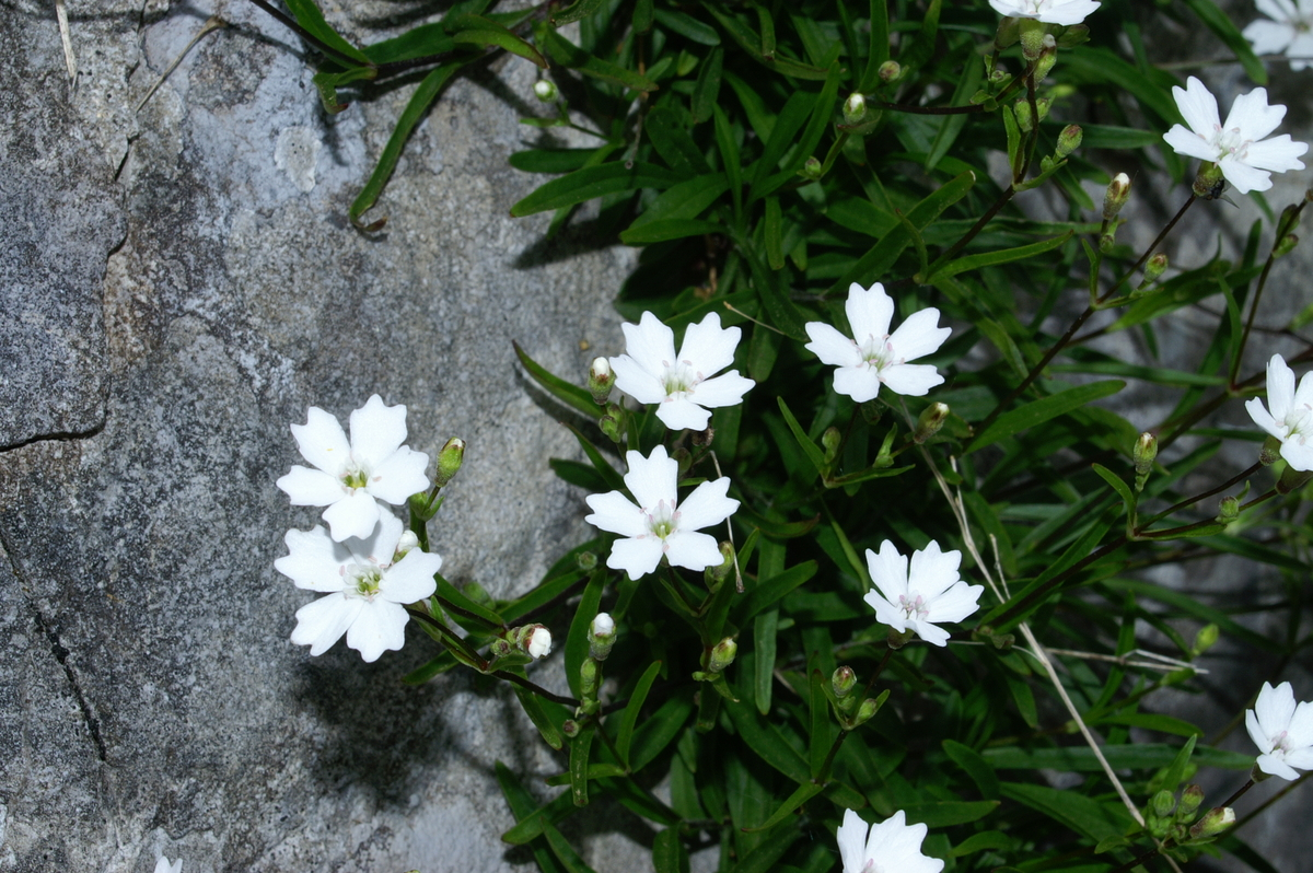 Planinski slanozor na Soriški planini.